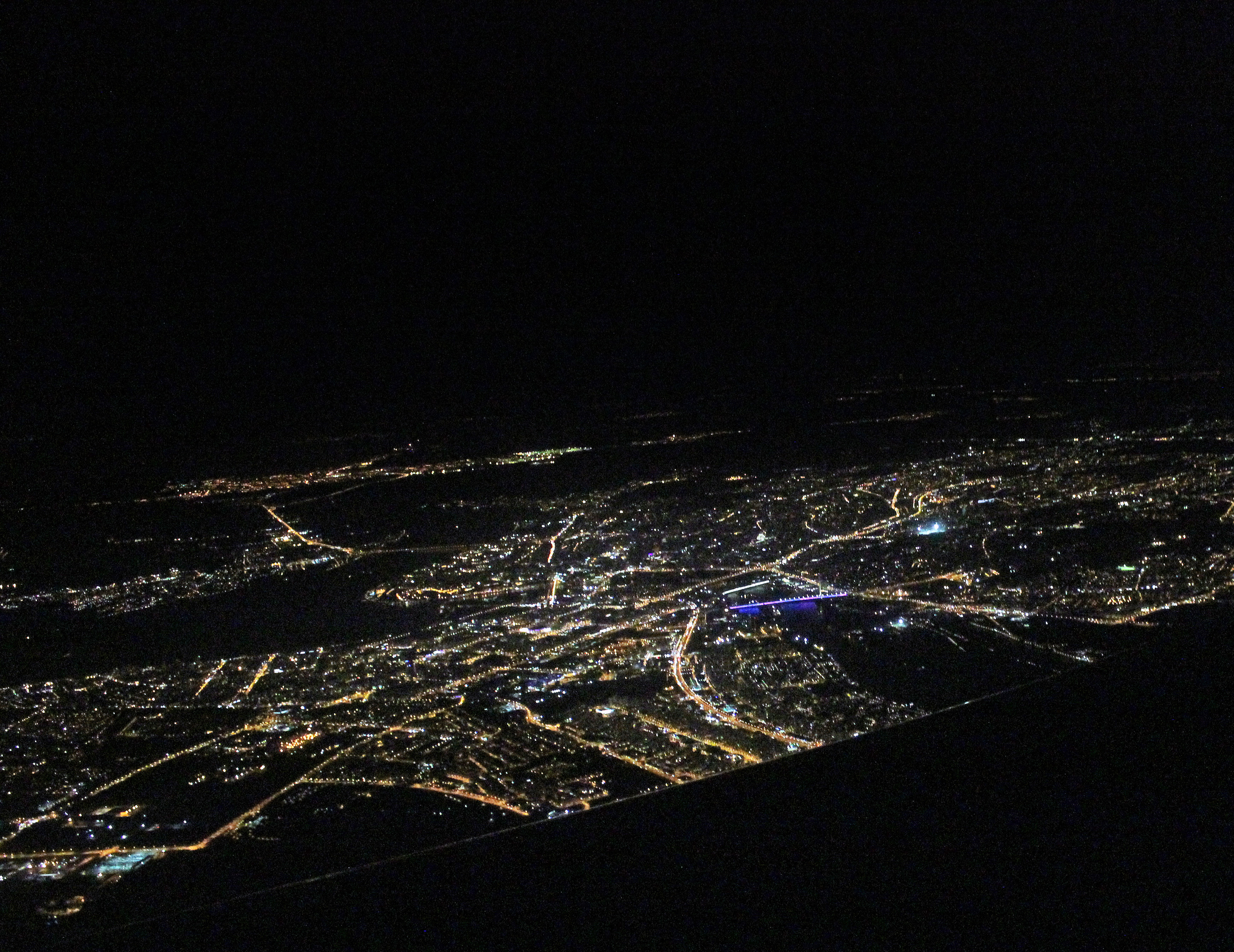 Вид с самолёта на ночной Белград